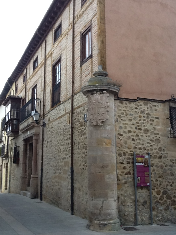 Edificación más antigua de Medina